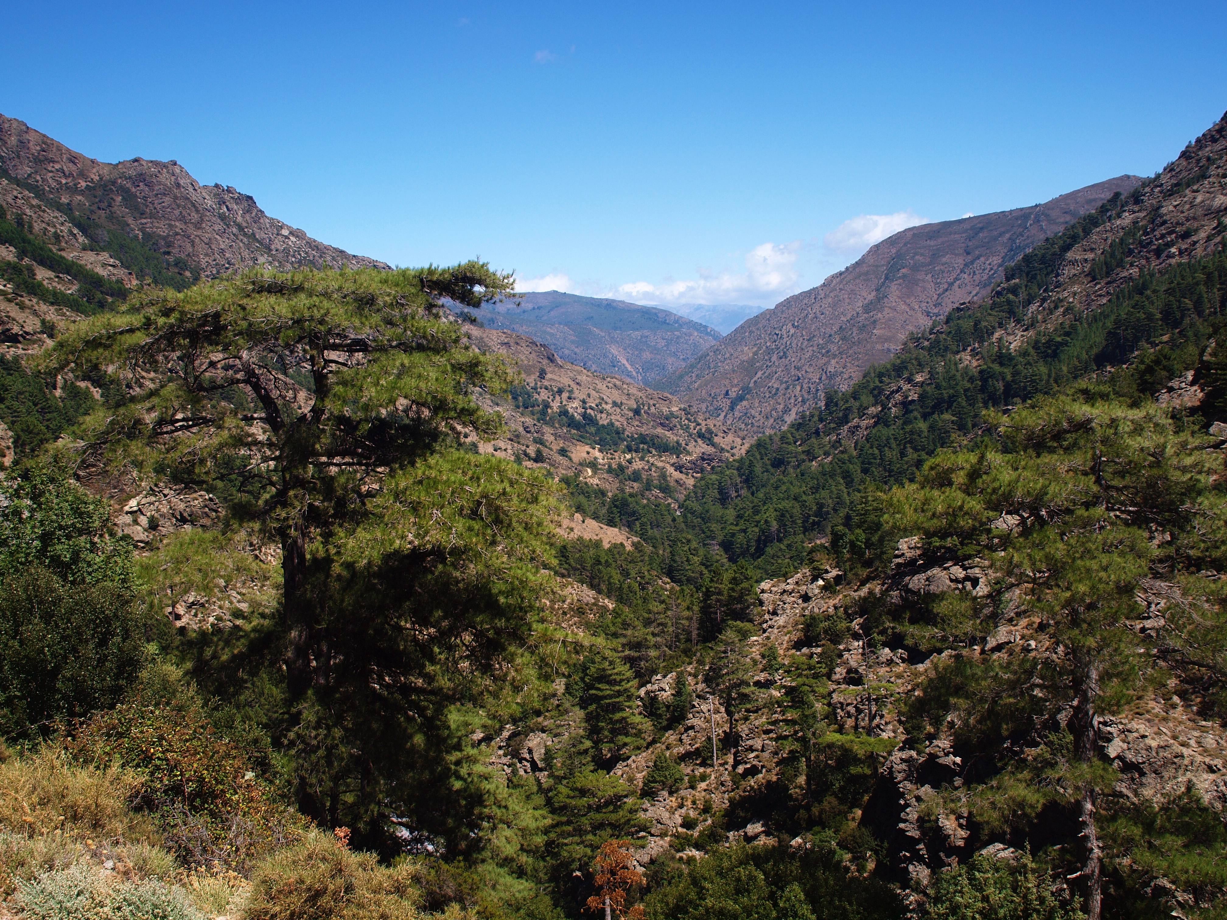 Asco (Corsica) - La vallée en amont du village, la forêt de Vecchietto